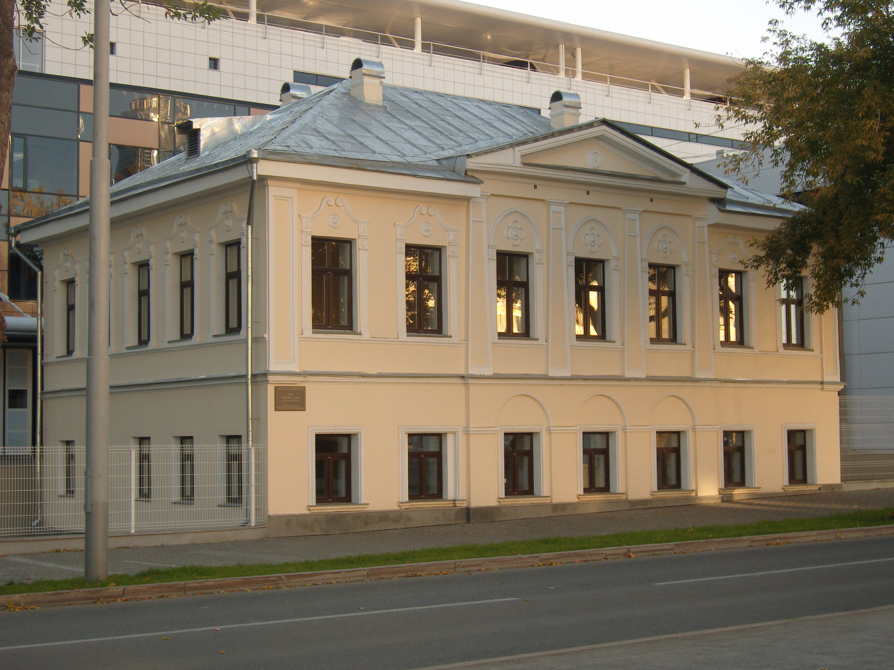 До причта Успенской старообрядческой часовни (улица Добролюбова, 12а)